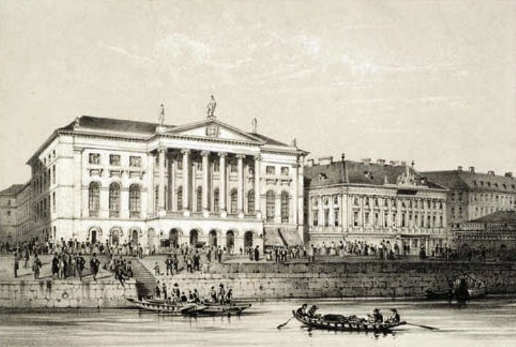 A pesti Redout épülete